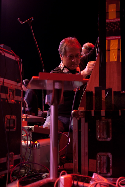 649テクノ親父こと松武親分。 tags: ymo osetsuy hidekimatsutake